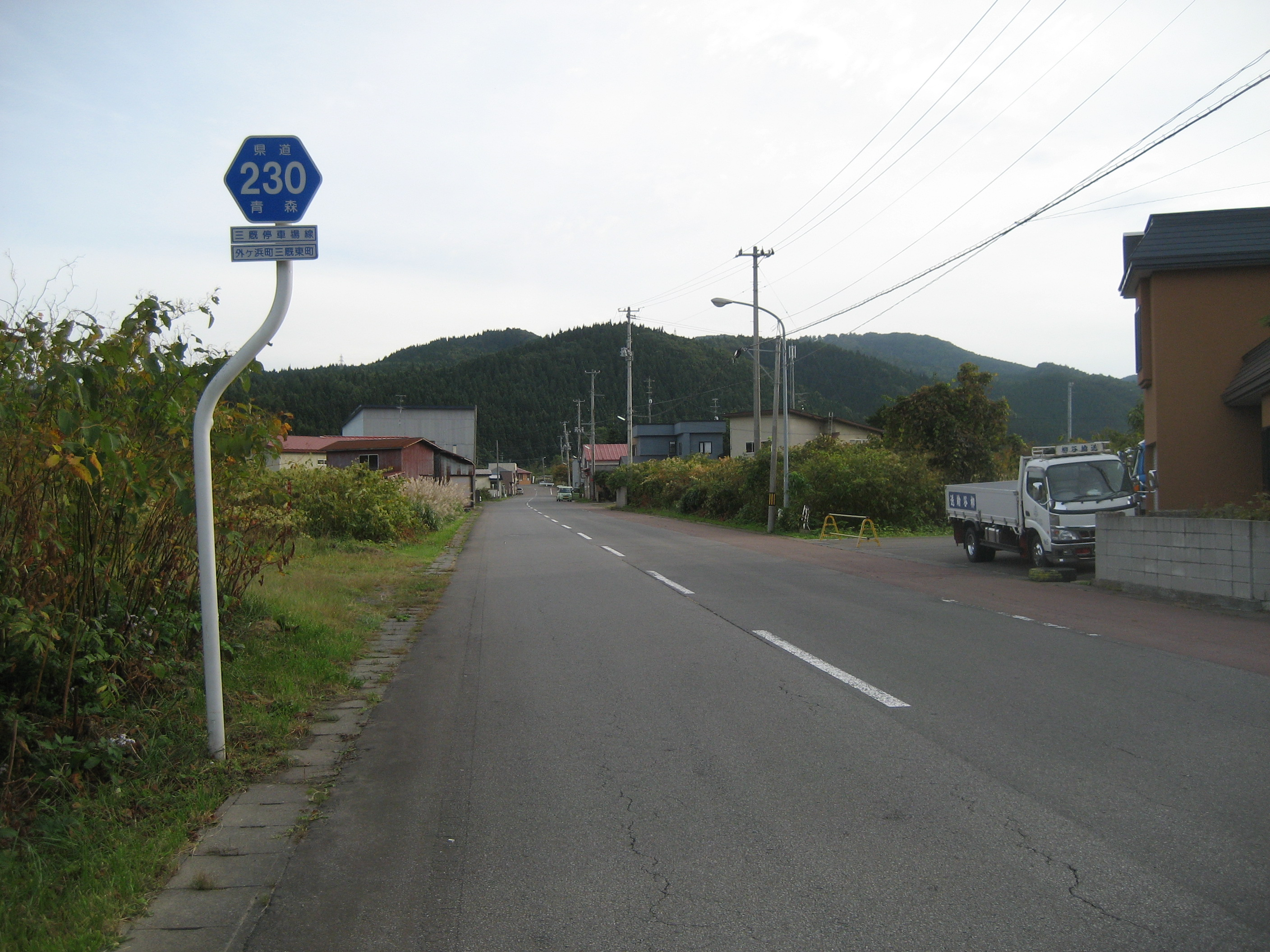 青森県道230号線外ヶ浜町三厩東町付近